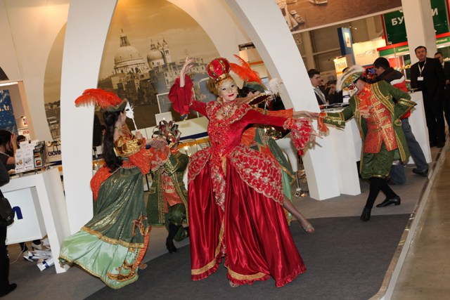 Экспоненты привлекают внимание посетителей по-разному